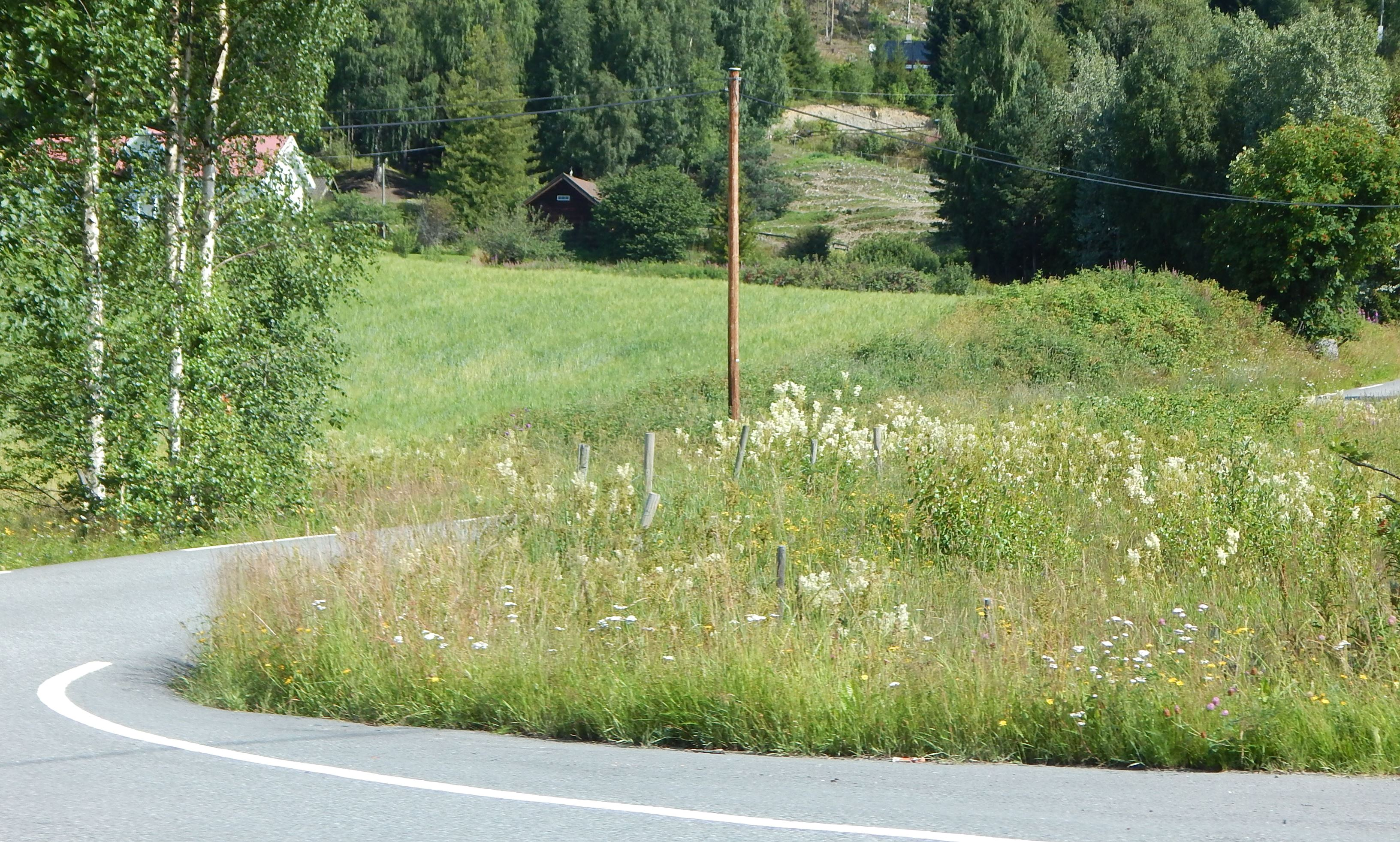 Vestrumsbygda (fylkesvei 2384, tidl. 129) sett fra primær fylkesvei 33